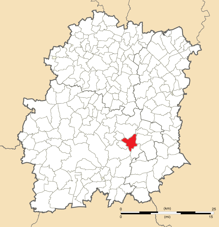 Carte de position de D'Huison-Longueville en Essonne (91)